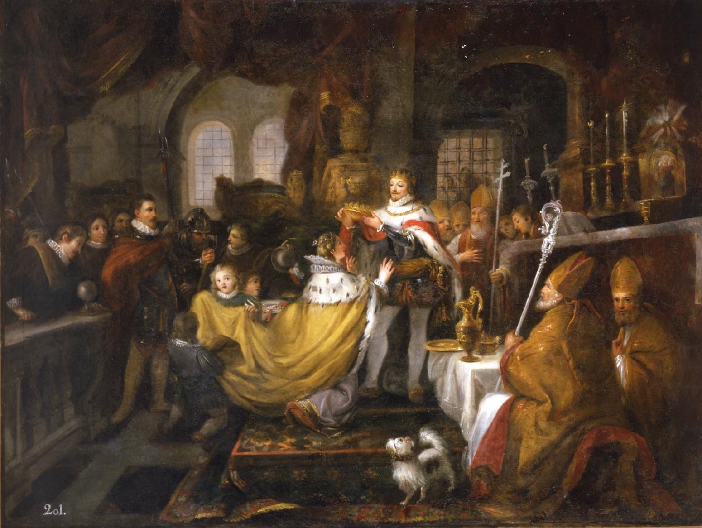 La obra representa la coronación del rey Alfonso XI de Castilla (1311-1350) y de su esposa, la reina María de Portugal, que tuvo lugar en 1332 en el monasterio de las Huelgas de Burgos.